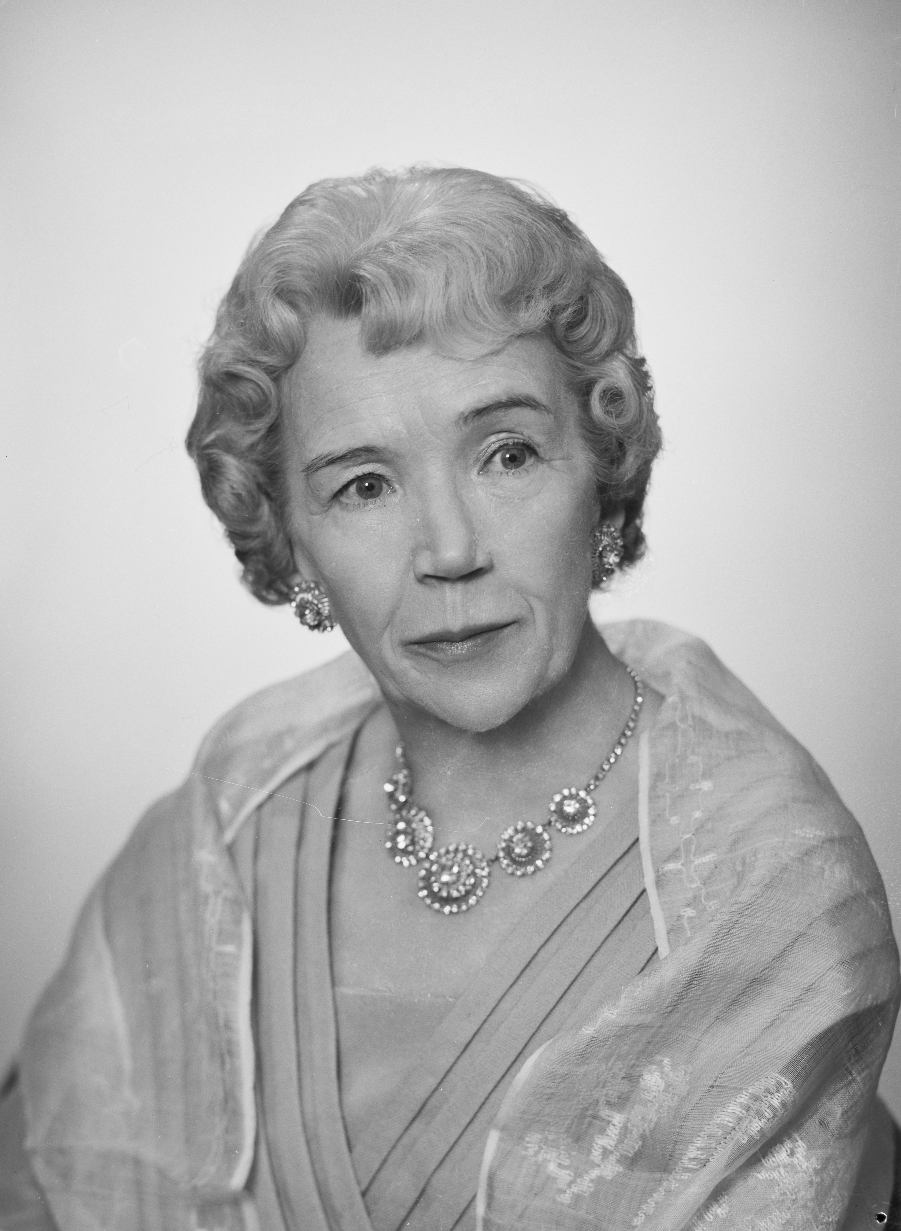 maaherratar, kansanedustaja Hellä Meltti; mustavalkoinen